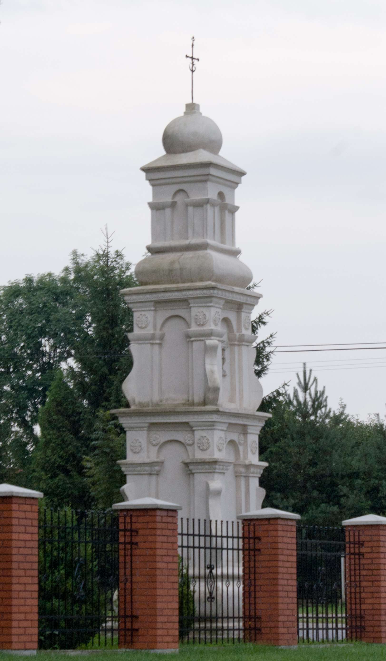 Kapliczka przy kościele pw. św. Marii Magdaleny w Ostrowie (powiat przemyski) z XVII w. w formie obelisku, zwieńczona krzyżem z umieszczonym w jego dolnej części "znakiem tatarskim", składającym się z pięcio- ostroramiennej gwiazdy ujętej od dołu półksiężycem (dawniej z piką). 01.1960.